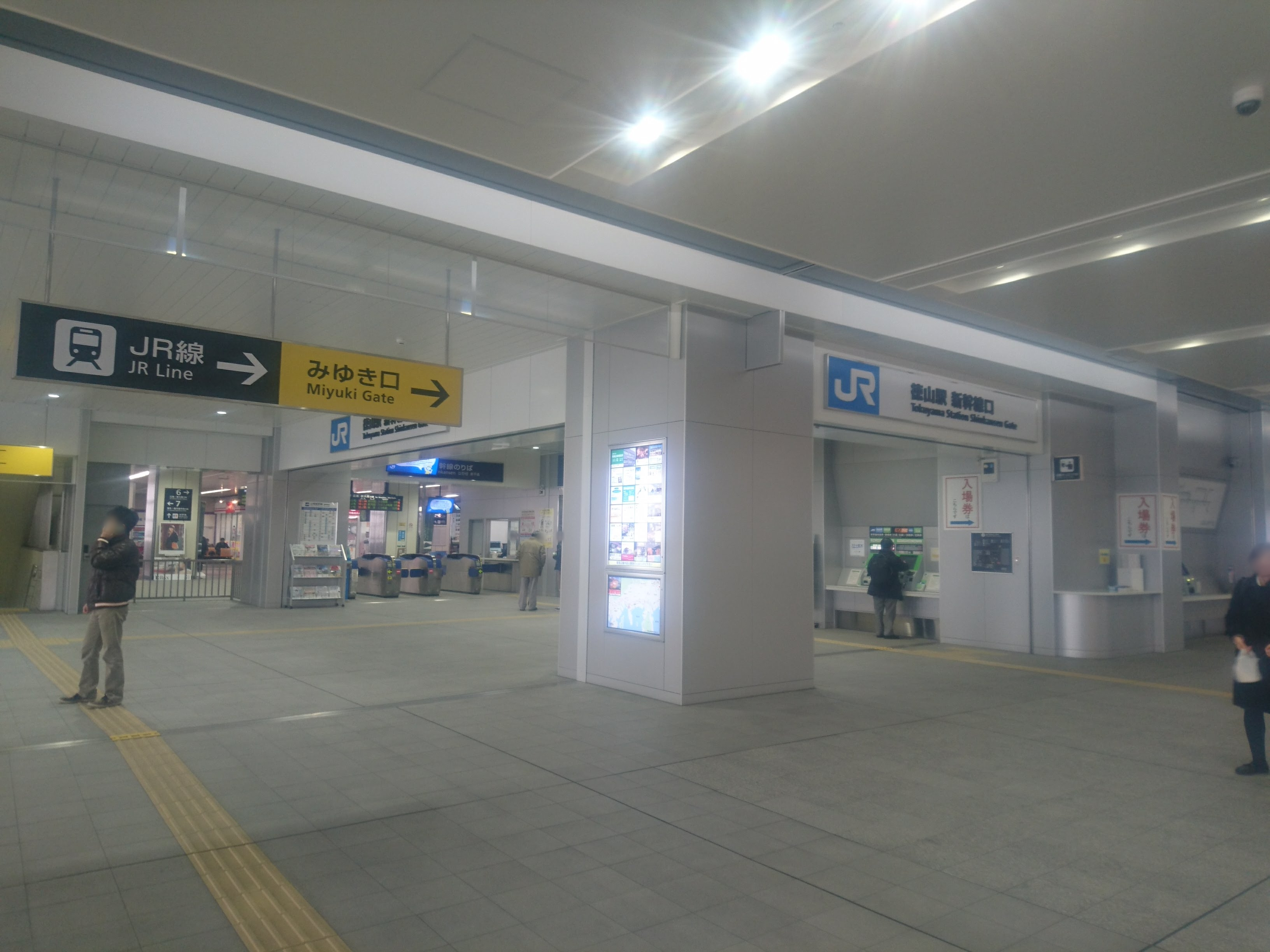 JR徳山駅新幹線口 （徳山駅南北自由通路より撮影）